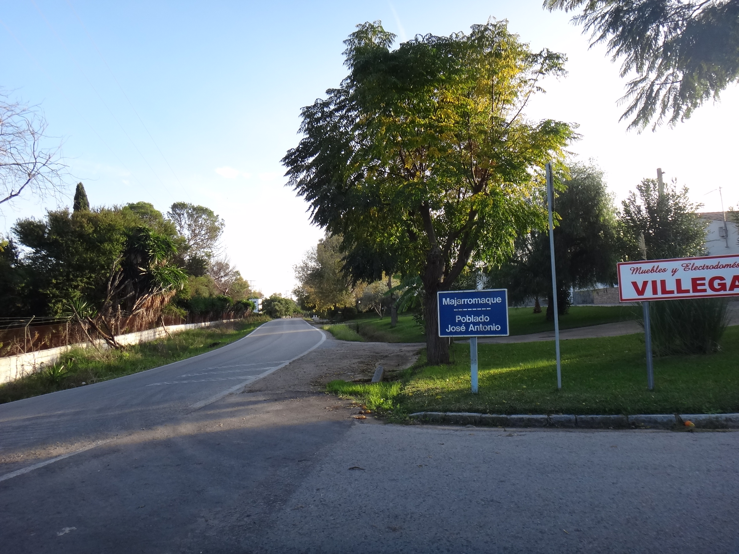 Poblado de José Antonio (carretera de Majarromaque) en Jerez de la Frontera (Andalucía, España)